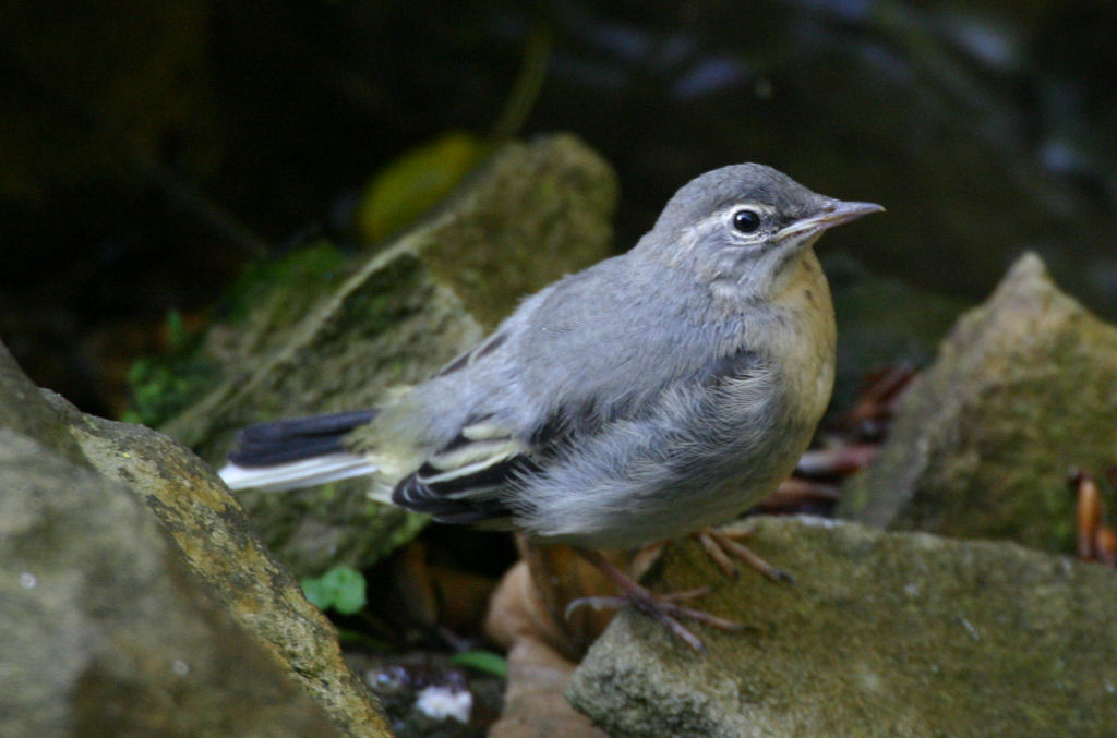 Juvenile Grey Wagtail. Taken at Lydbrook, England